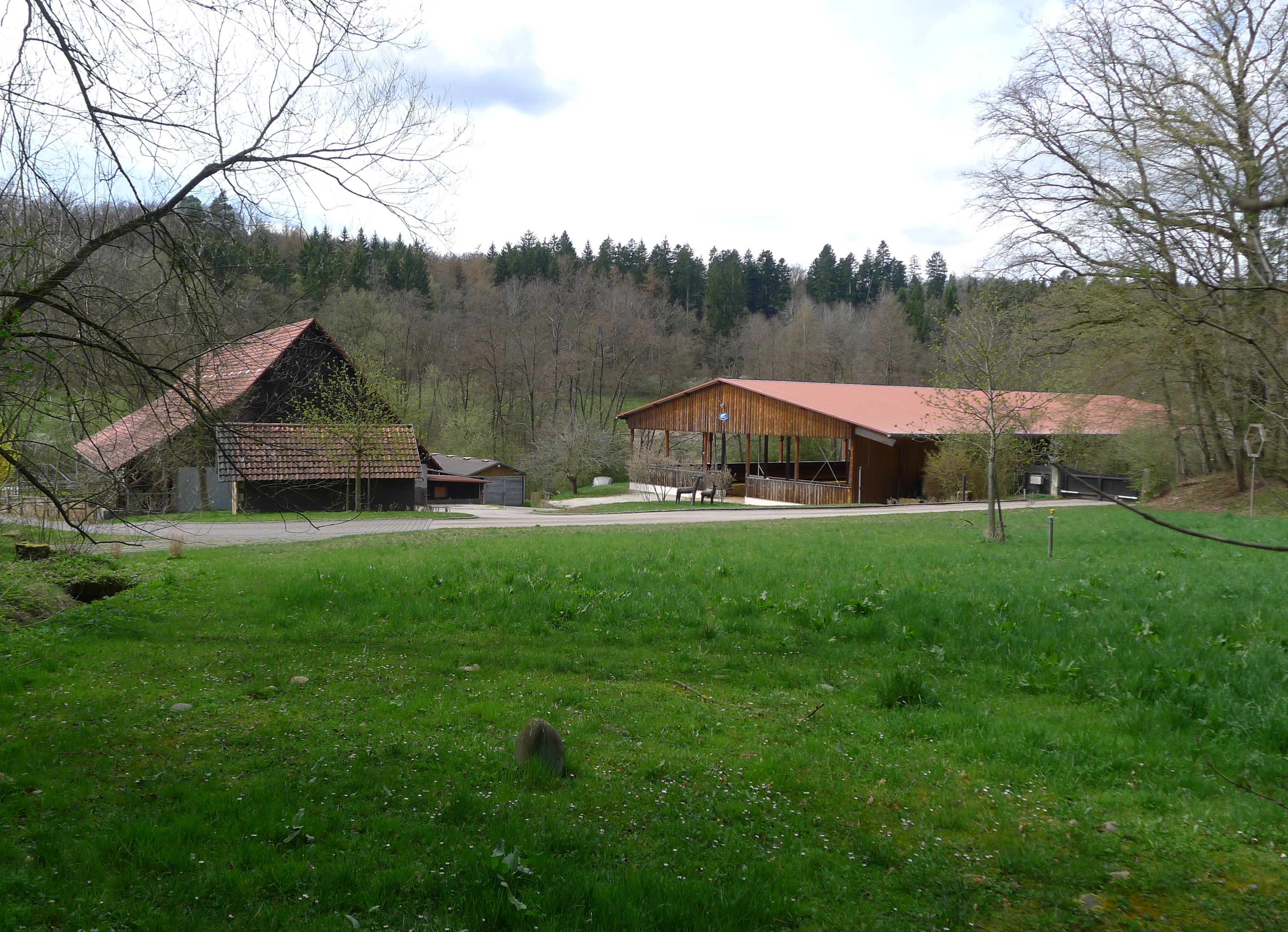 De paardenschuren van de Walzenmühle in het Siebenmühlental (Stuttgart)